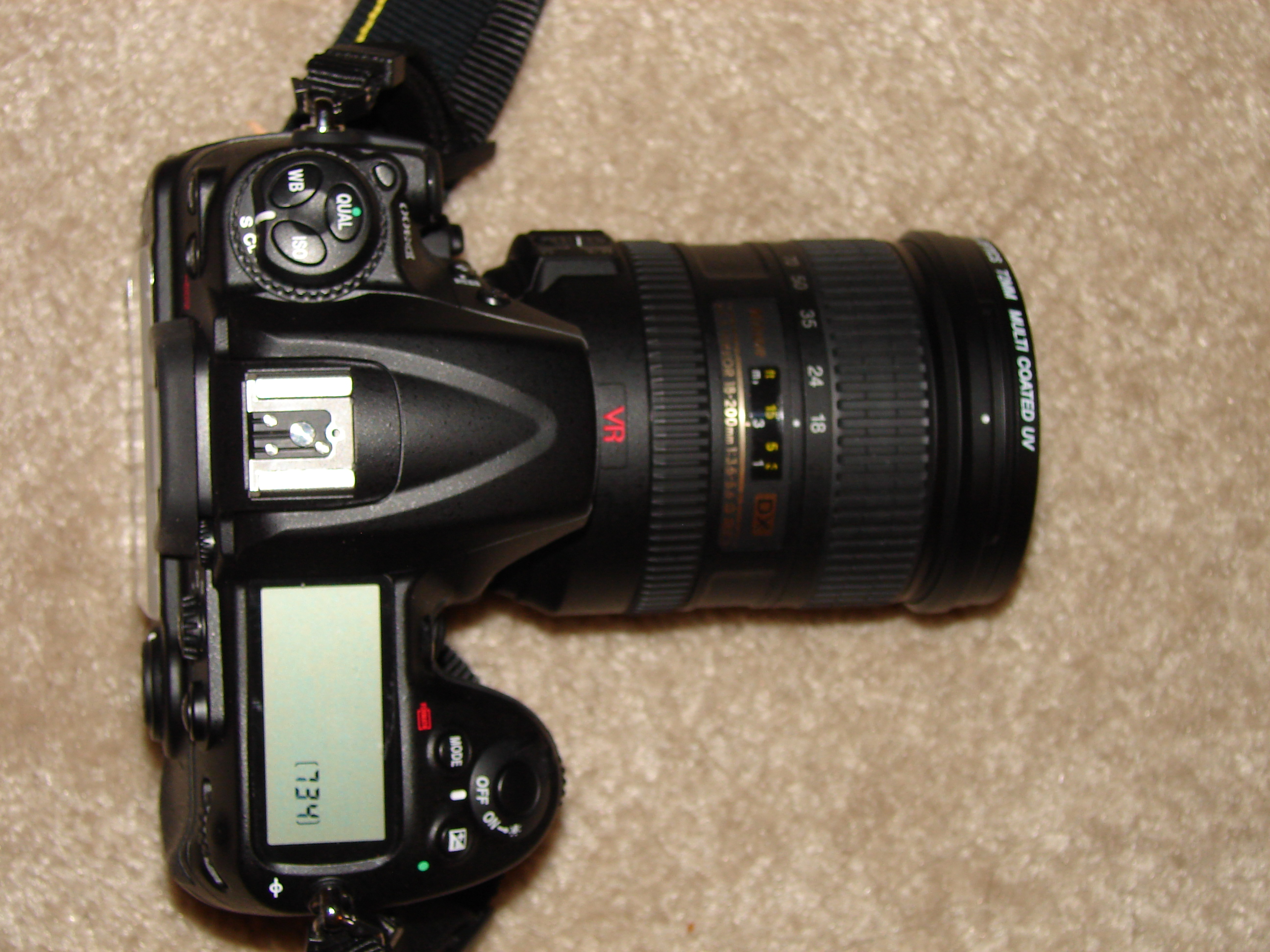 നിക്കോൺ ഡി300 - മുകളിൽ നിന്നുള്ള കാഴ്ച്ച